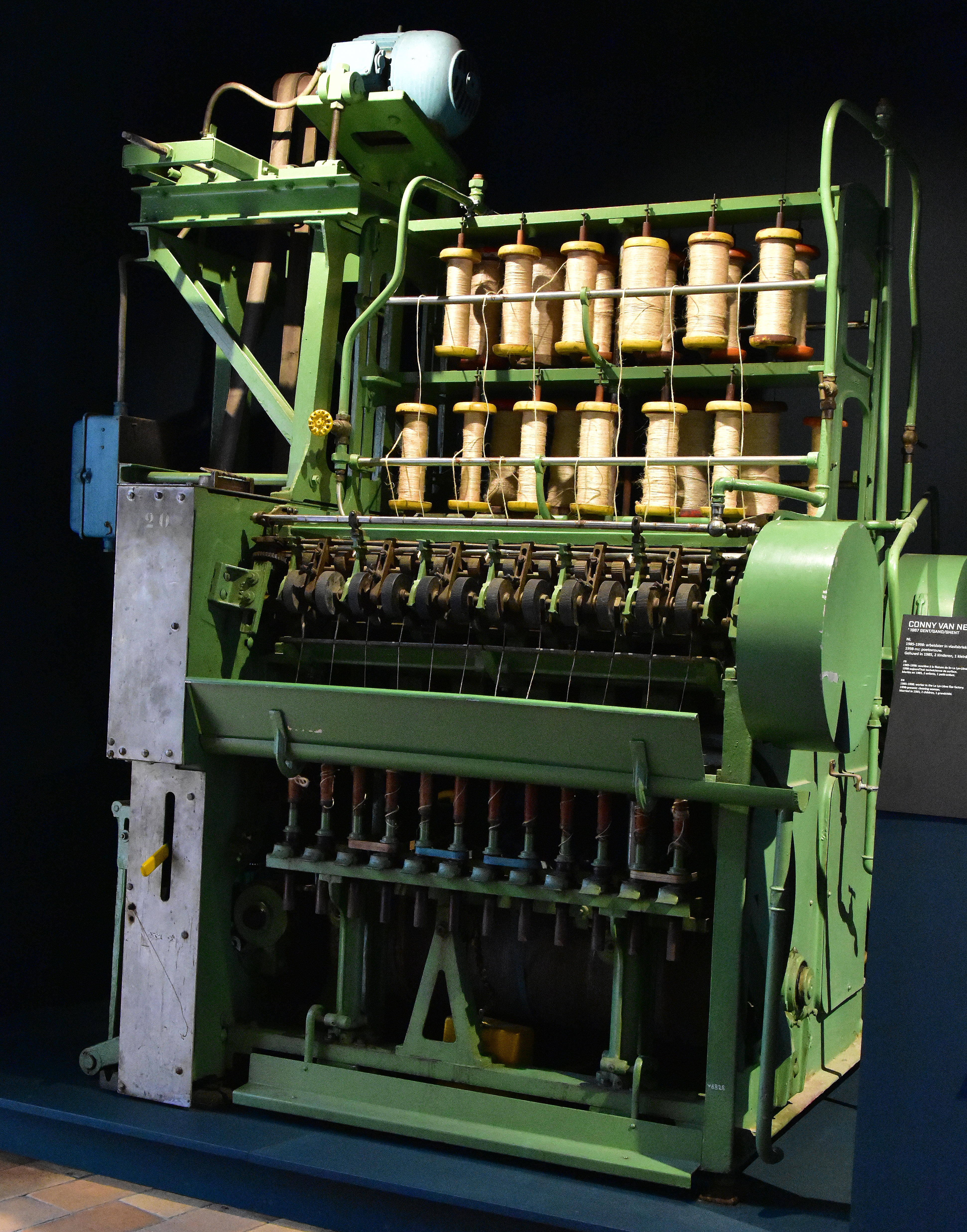 Spinmachine James Mackie and Sons (Belfast) - Industriemuseum Gent 18-11-2019 This photo of movable heritage has been taken in the Flemish Region